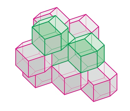 AuCu構造